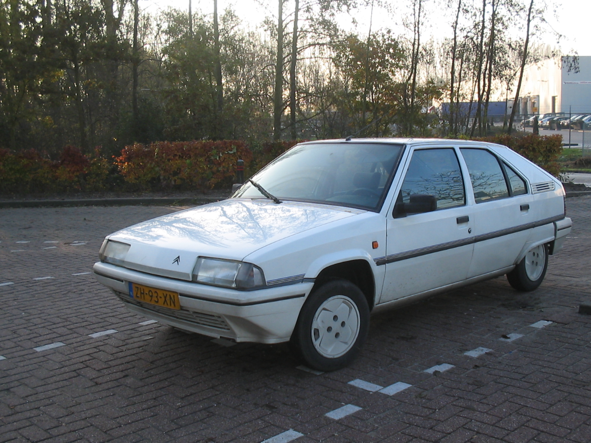 Citroen BX, 1991, eigen auto met 241.000 km op teller (nov. 2005)